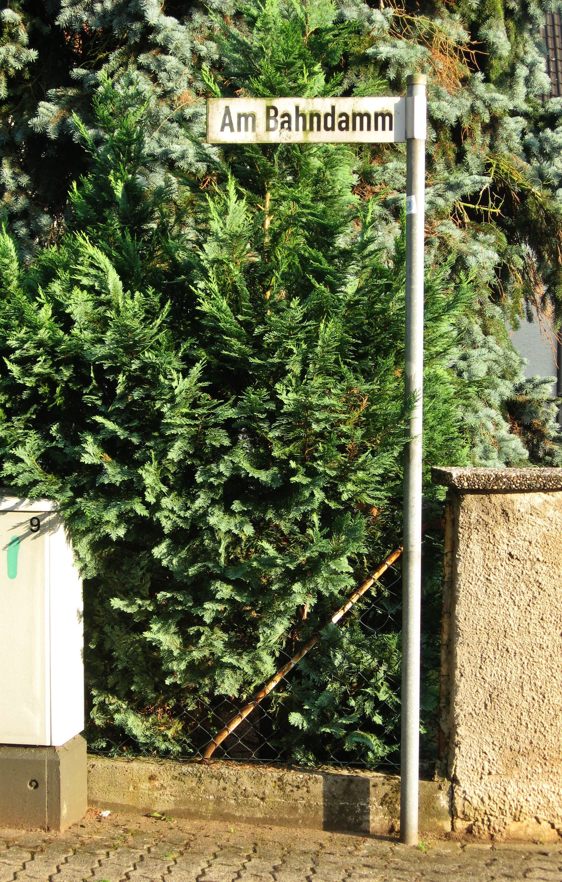 Alte Straßenbezeichnung Fischbach bei Dahn kennzeichnet den Verlauf der Wasgauwaldbahn